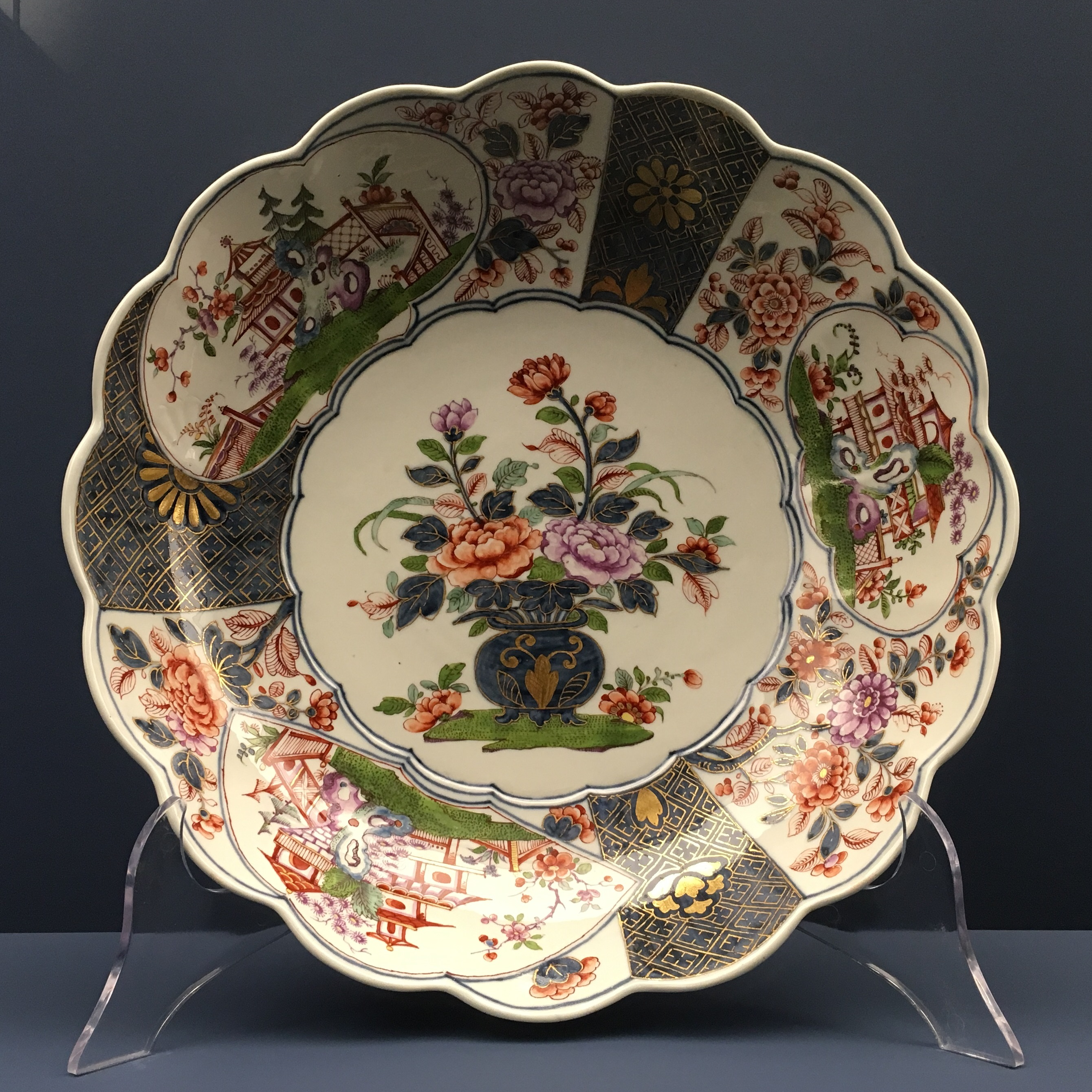 Schüssel im Imari-Stil mit Gartenszenen, Chrysanthemen und Päonien, 1744/49. Porzellan, bemalt, Goldhöhung. Kaiserliche Porzellanmanufaktur Wien (1744-1864). Erworben 2005 durch Fürst Hans-Adam II. von und zu Liechtenstein. (Ausstellung Liechtenstein. Die Fürstlichen Sammlungen. 12.11.2016 – 19.03.2017, Kunstmuseum Bern.)